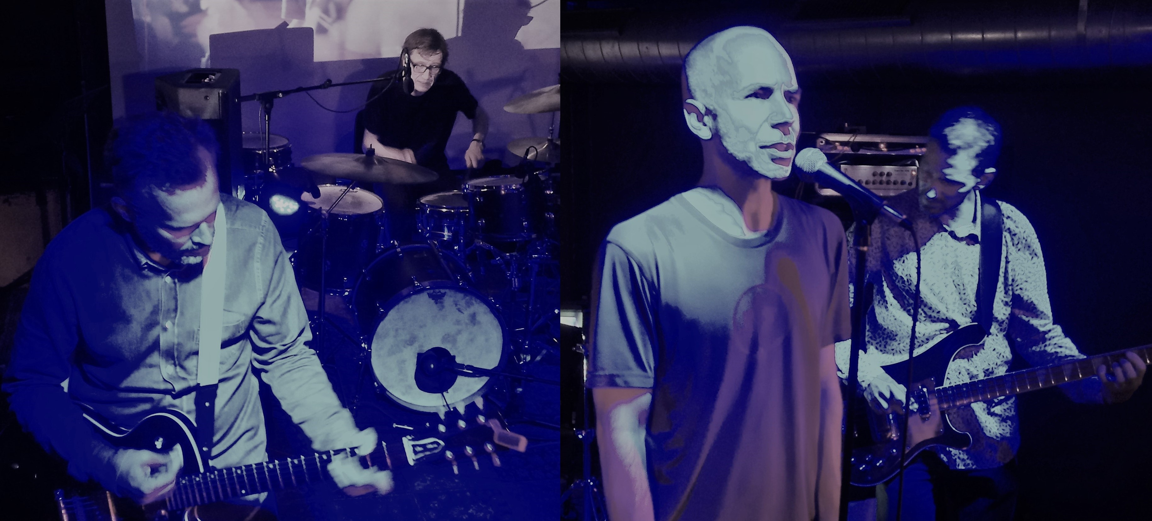 Den danske gruppe How Do I, 23. september 2017 på spillestedet Barbue i København